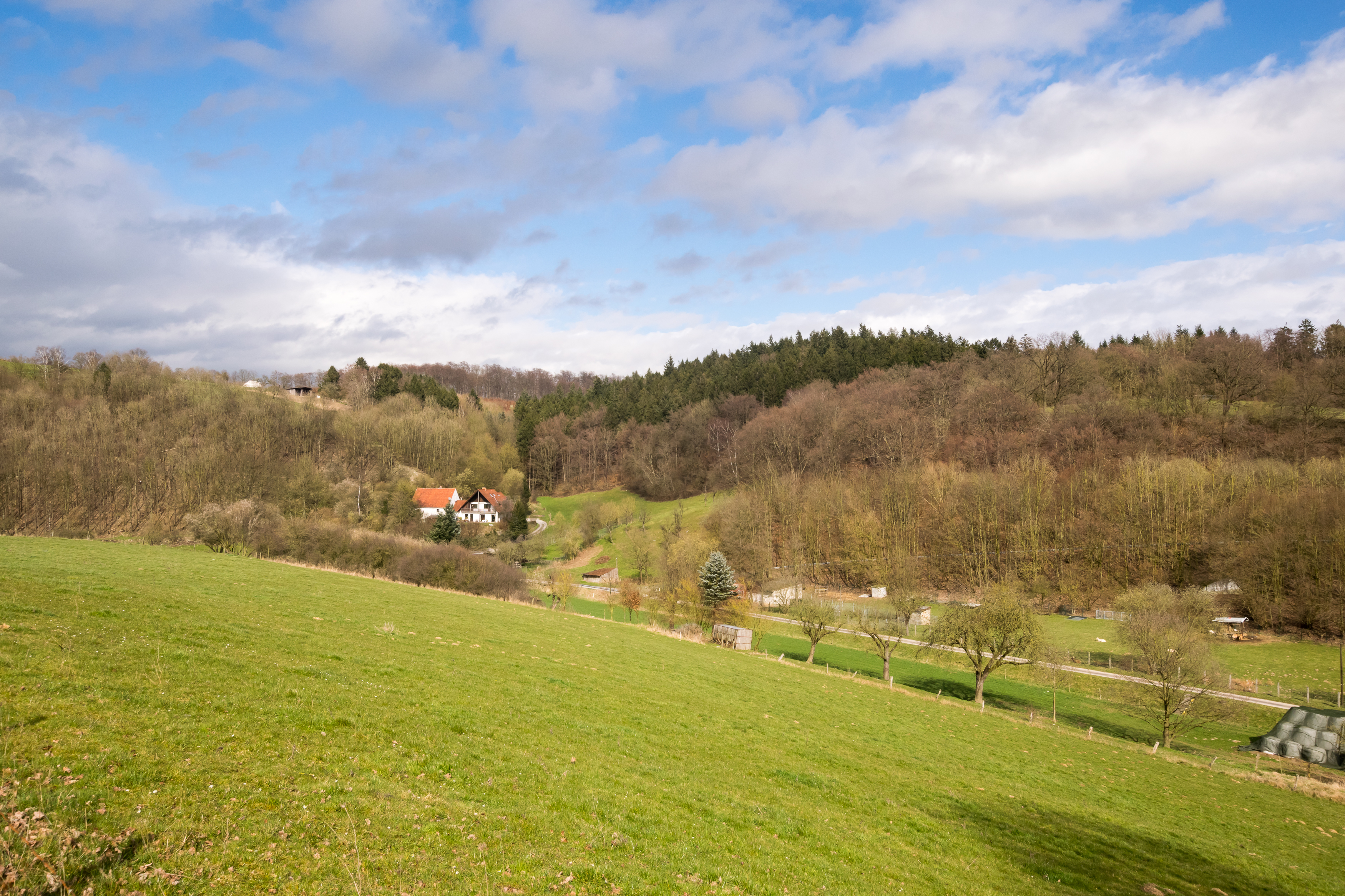 Landschaftsschutzgebiet Hamborn-Lieth am Hochwasserrückhaltebecken Borchen